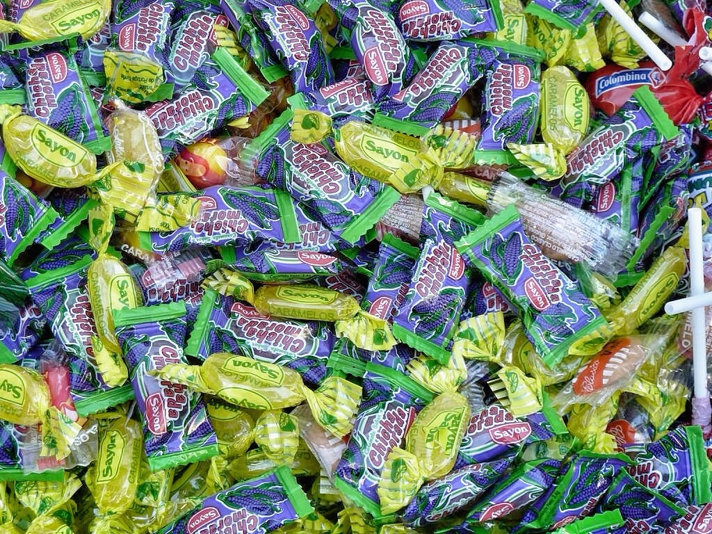 Buenos Aires Celebra Perú, Avenida de Mayo.